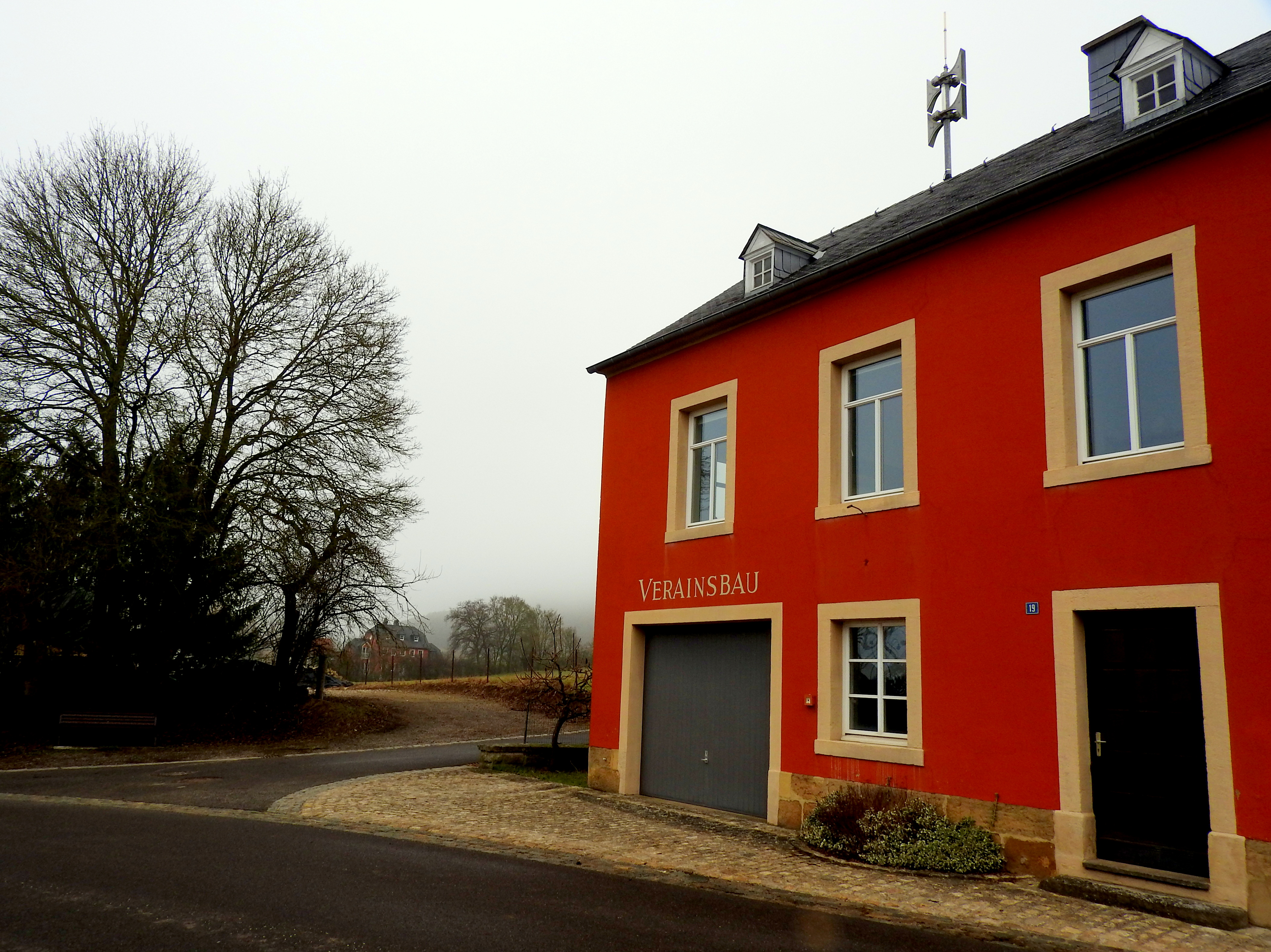 Veräinsbau in Hemstal